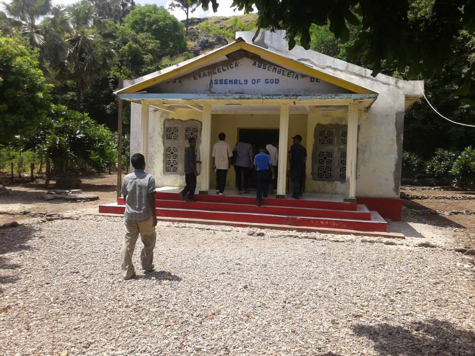 Igreja Evangélica Assembleia de Deus, Vatuo, Norte de Atauro